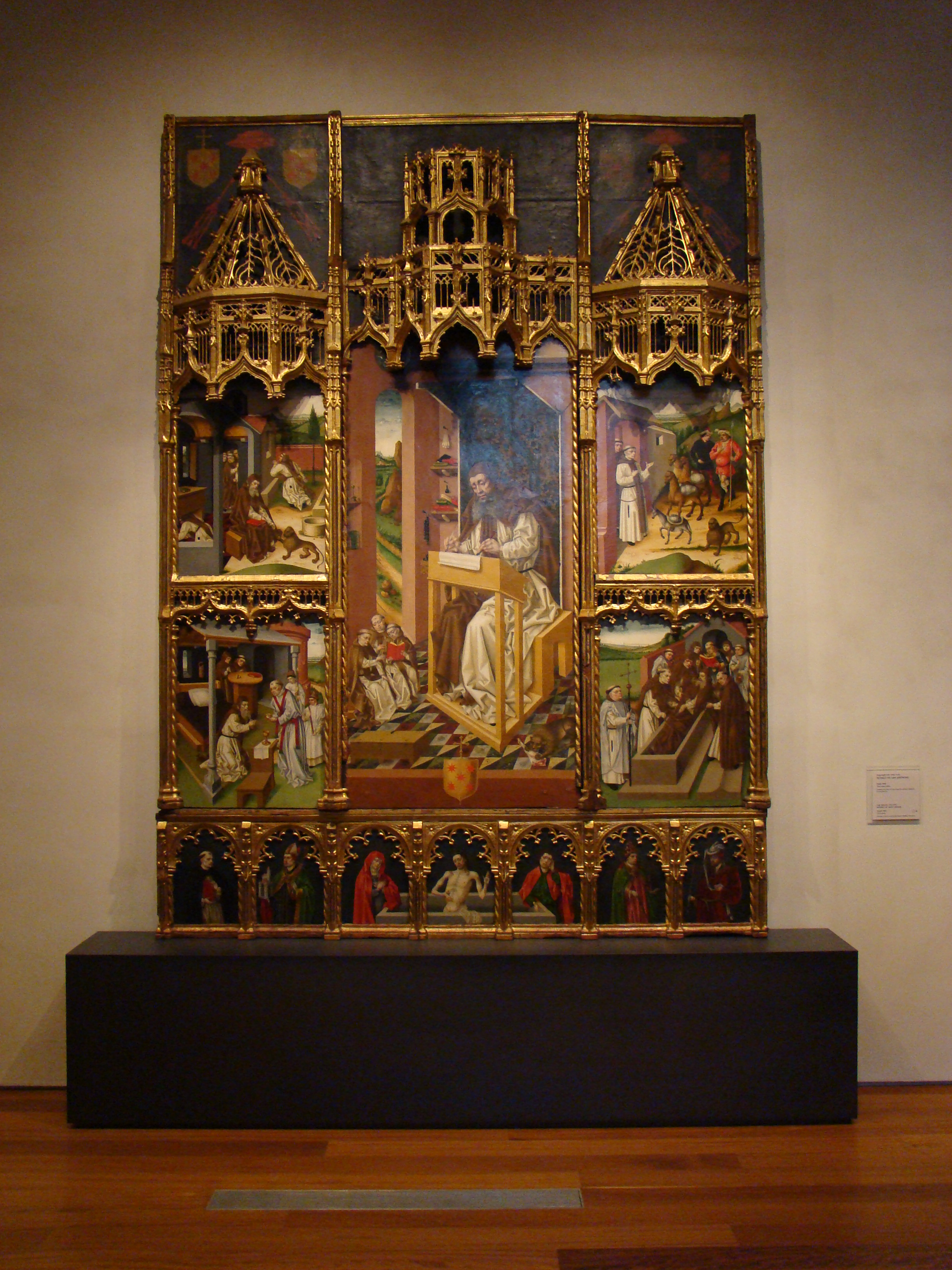 Retablo de San Jerónimo procedente del monasterio de La Mejorada (Olmedo, España). Pintura sobre tabla. Autor de la pintura Jorge Inglés. Se conserva en el Museo Nacional Colegio de San Gregorio.